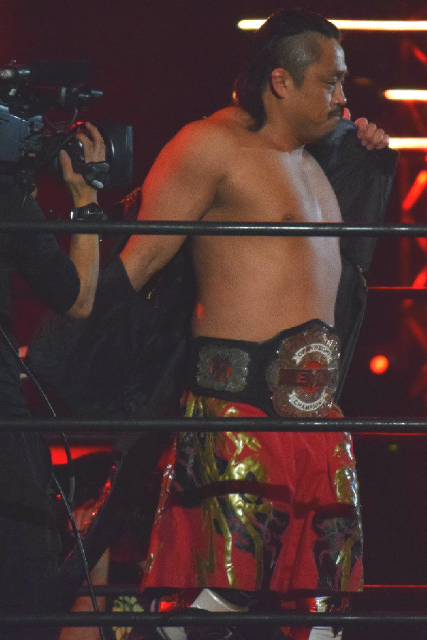 2017年2月11日 大阪府立体育会館 「THE NEW BEGINNING in OSAKA」 後藤洋央紀